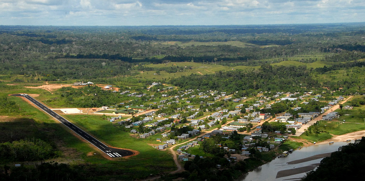 Aeroporto e área urbana de Jordão - Acre